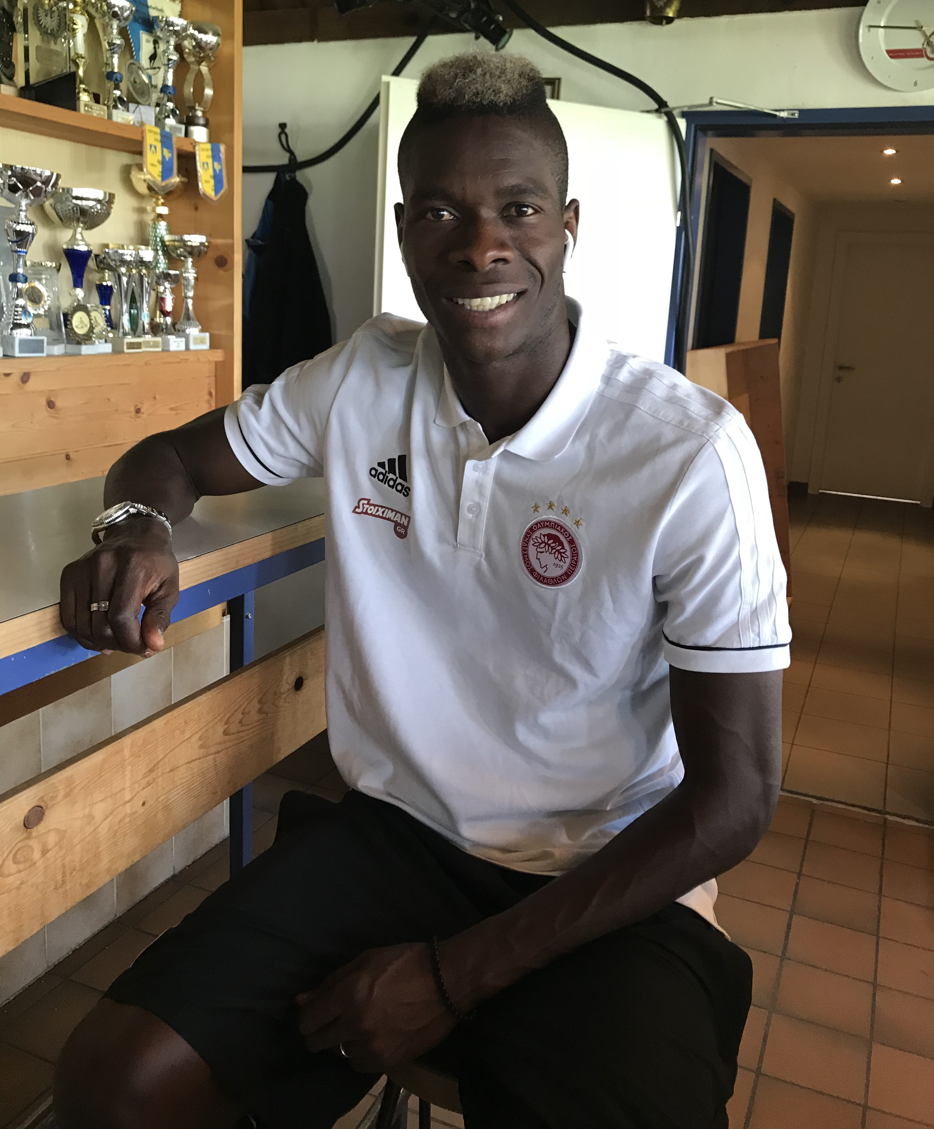 Pape Abou Cissé beim Freundschaftsspiel gegen WSG Swarovski Watten in Oberperfuss